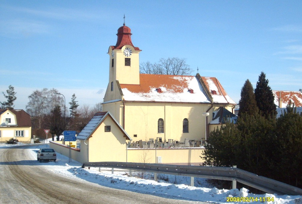 Kostel Nanebevzetí Panny Marie ve Dvorech nad Lužnicí